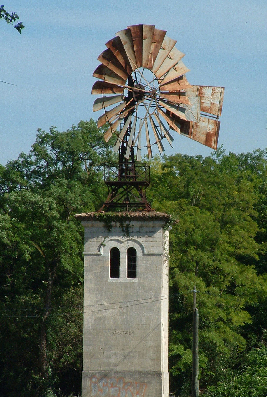 Près de Pierrelatte (D138 près de Vénéjan)- Eolienne pour le pompage